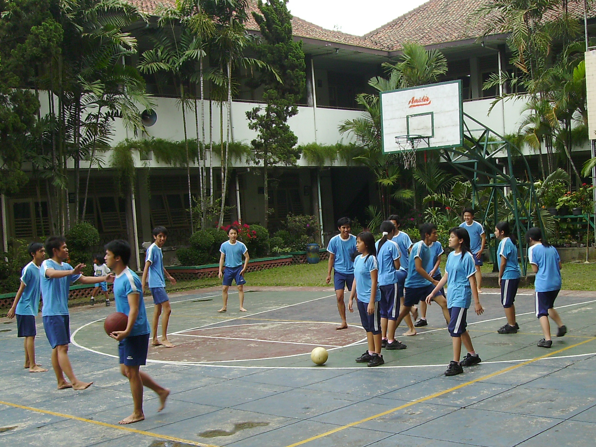 Siswi-Siswa SMA Trinitas sedang berolahraga